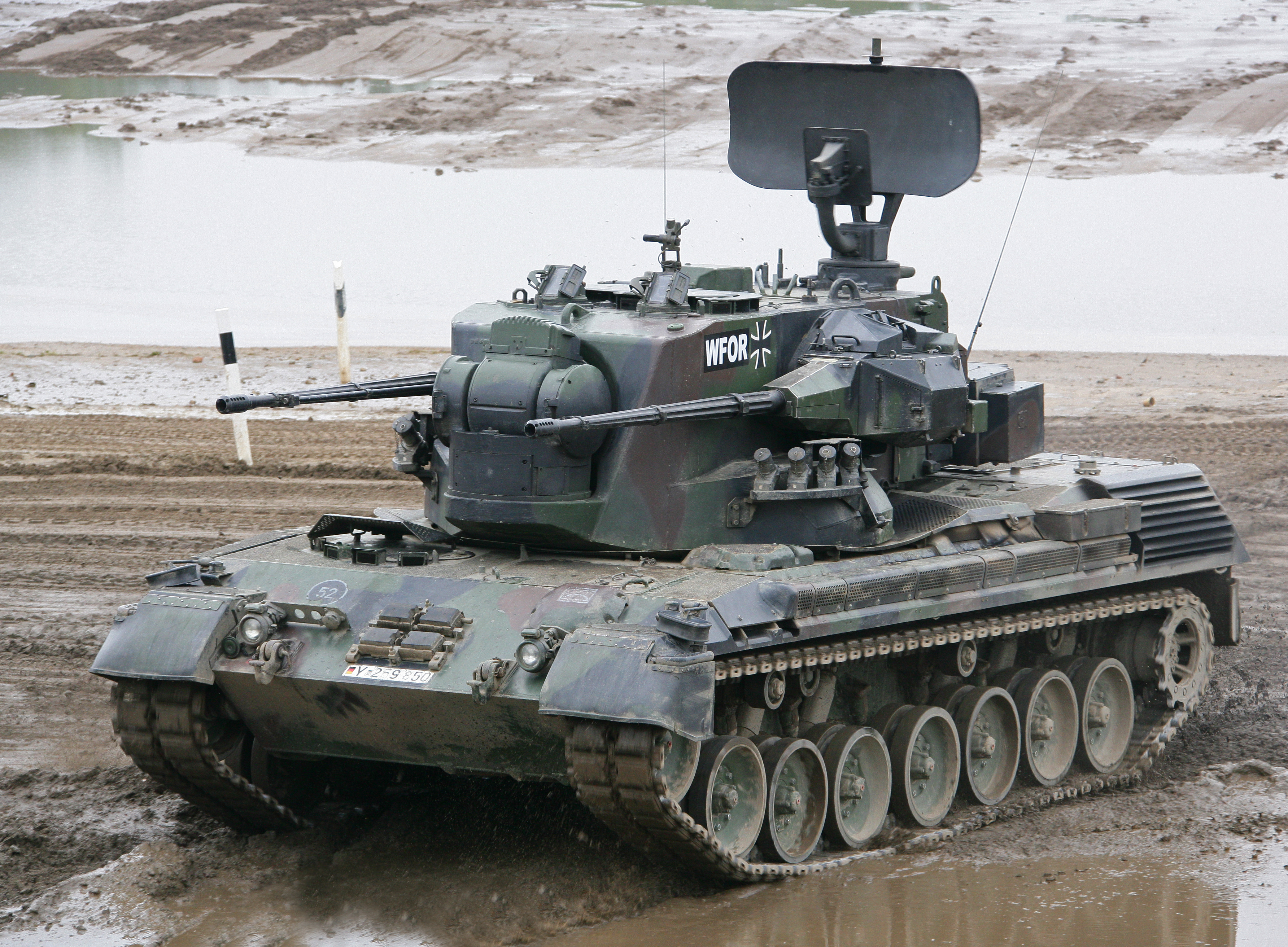 Flugabwehrkanonenpanzer ( FlakPz ) Gepard 1 A2 beim Vorüben zur Informationslehrübung Heer am Ausbildungszentrum Munster. ©Bundeswehr/Rott